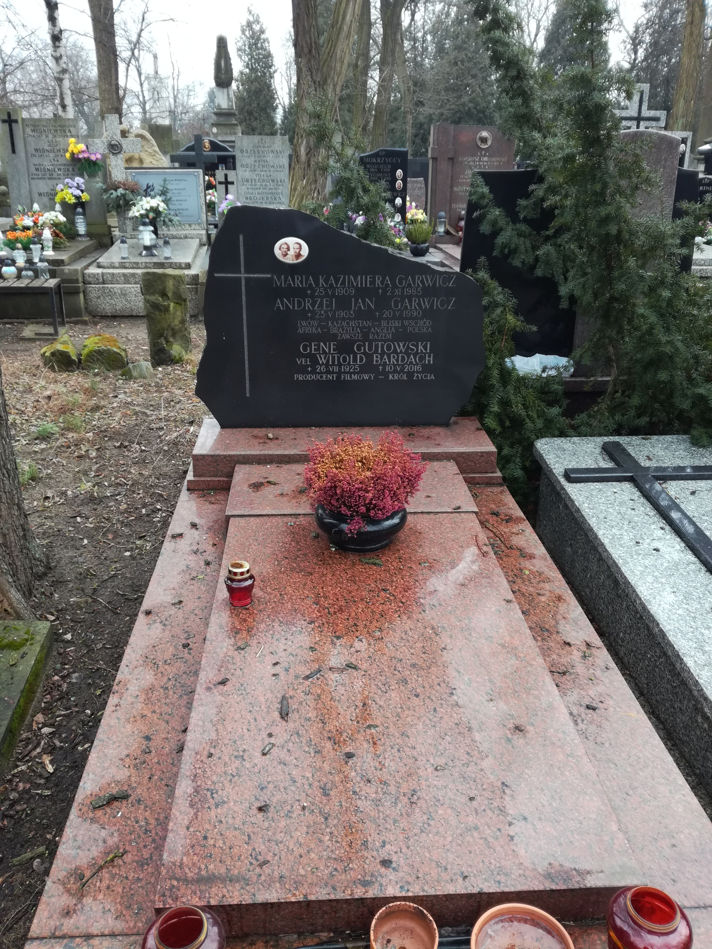 grób Gene'a Gutowskiego (polsko-amerykańskiego producenta filmowego) na Cmentarzu Bródnowskim.